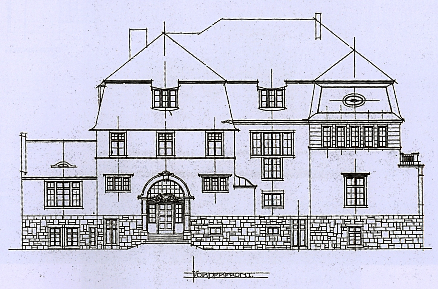 Villa